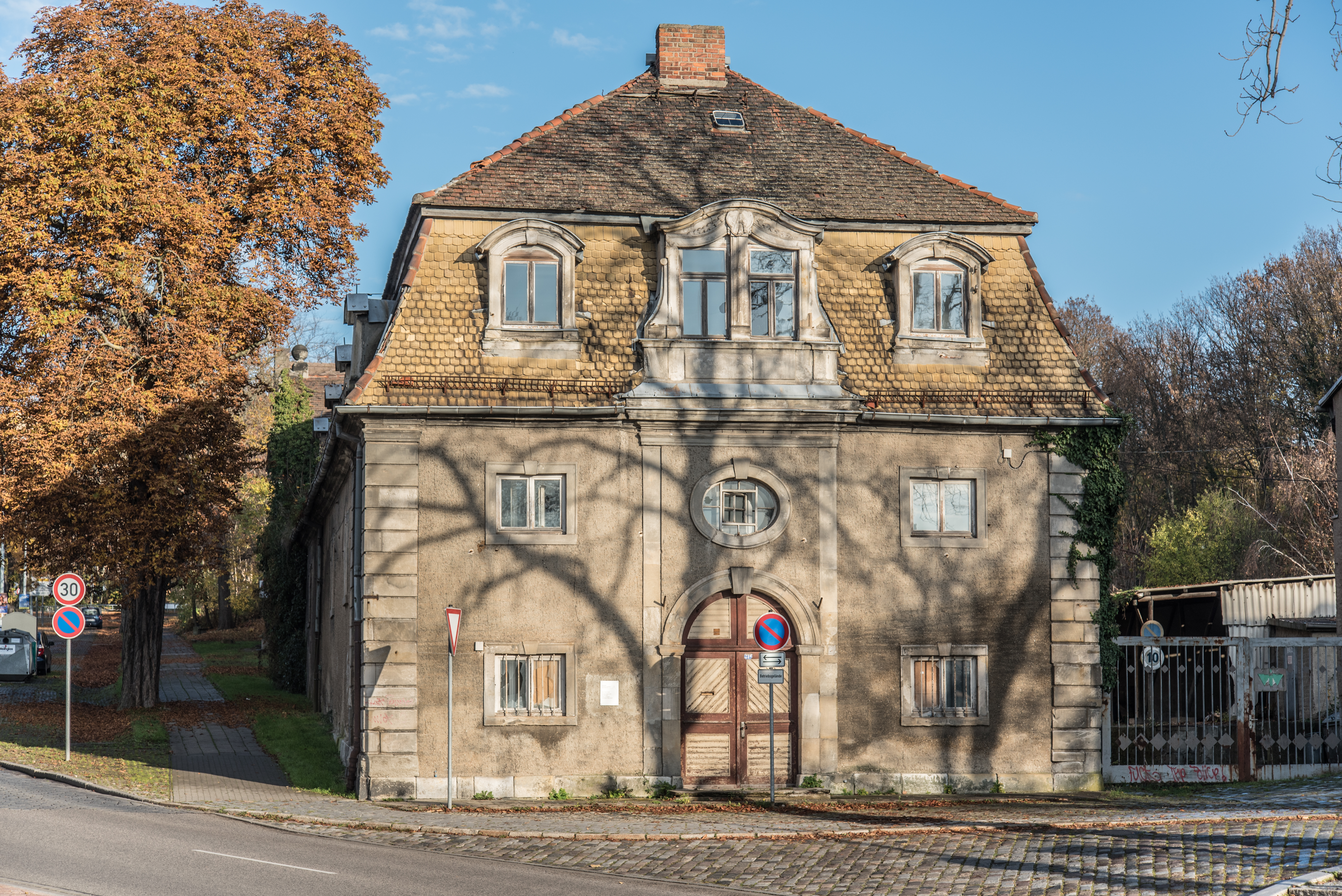 Weißenfels, Zeitzer Straße 26, 28, 30